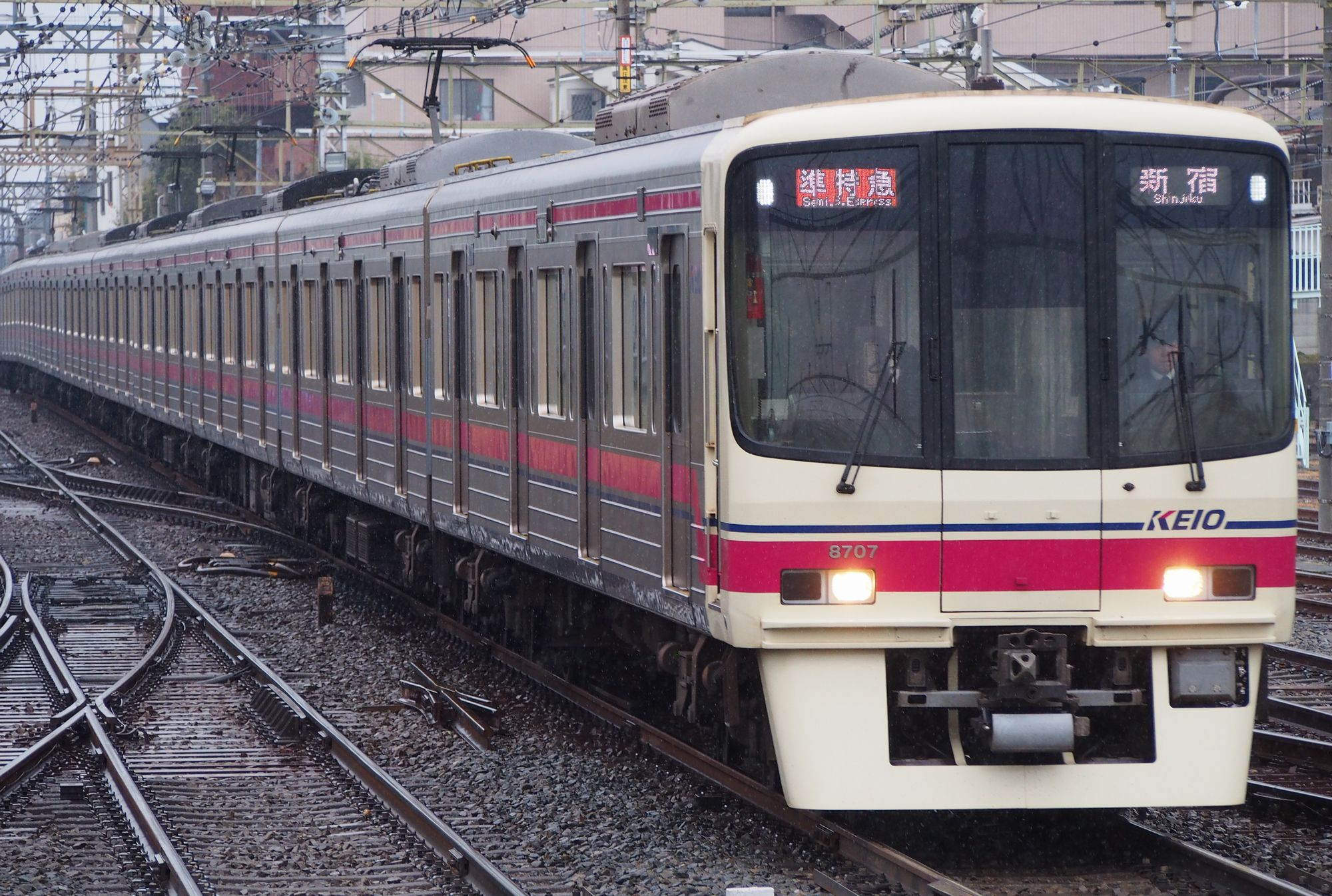 準特急新宿行き Olympus E-PL5